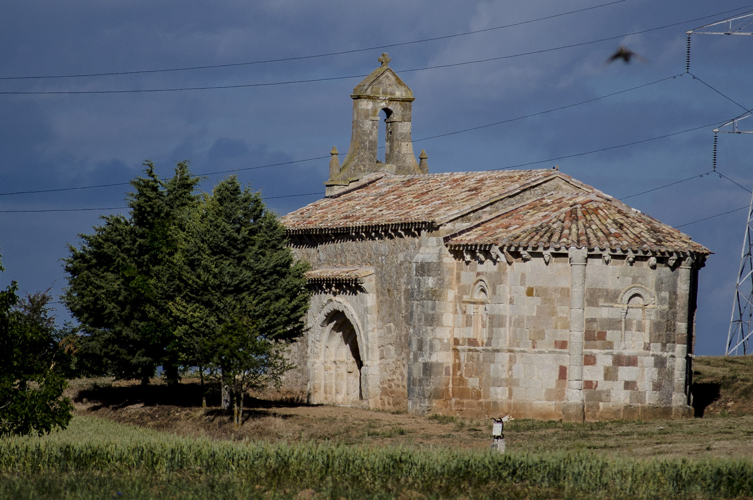 Ermita de San Cristóbal. Sotresgudo.